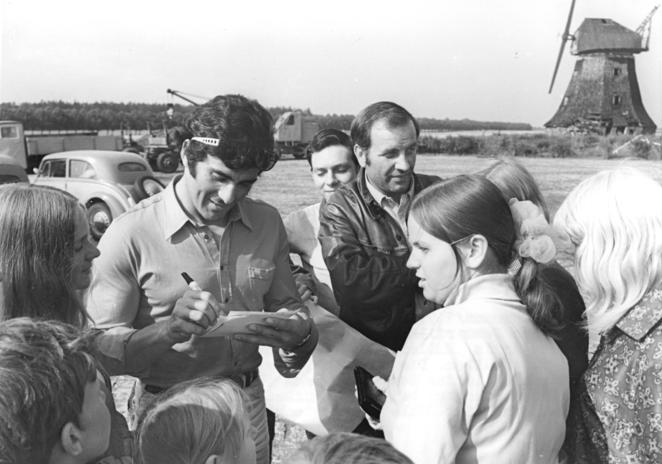 Rostock, Gojko Mitic, Armin Müller-Stahl Zentralbild Sindermann 1.7.70 Rostock: Sommerfilmtage Wie immer bei den Sommerfilmtagen hatten die Filmlieblinge Gojko Mitic und Armin Müller-Stahl (r.) unzählige Autogrammwünsche zu erfüllen. Die Künstler, die in dem traditionellen Indianerfilm der Sommerfilmtage ("Tödlicher Irrtum") mitwirken, besuchten bei ihrem Aufenthalt im Küstenbezirk die Dummerstorfer Mühle bei Rostock. Abgebildete Personen: Mitic, Gojko: Schauspieler, Jugoslawien (GND 118582798) Müller-Stahl, Armin: Schauspieler, Bundesrepublik Deutschland